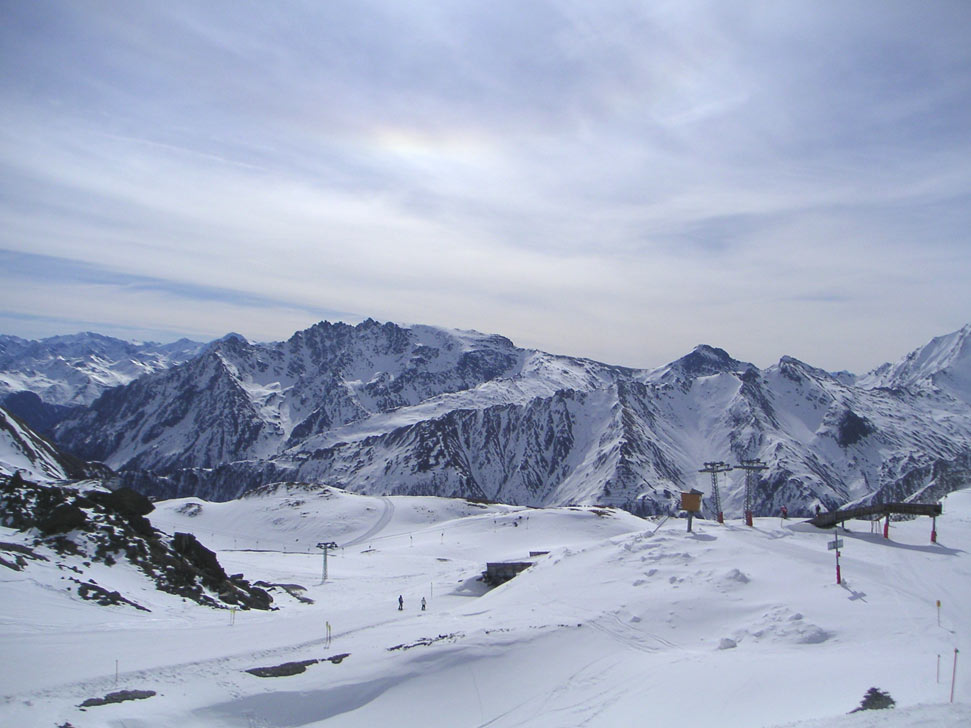 Auf dem Bild ist ein Teil des Skigebiets Samnaun - Ischgl zu sehen.